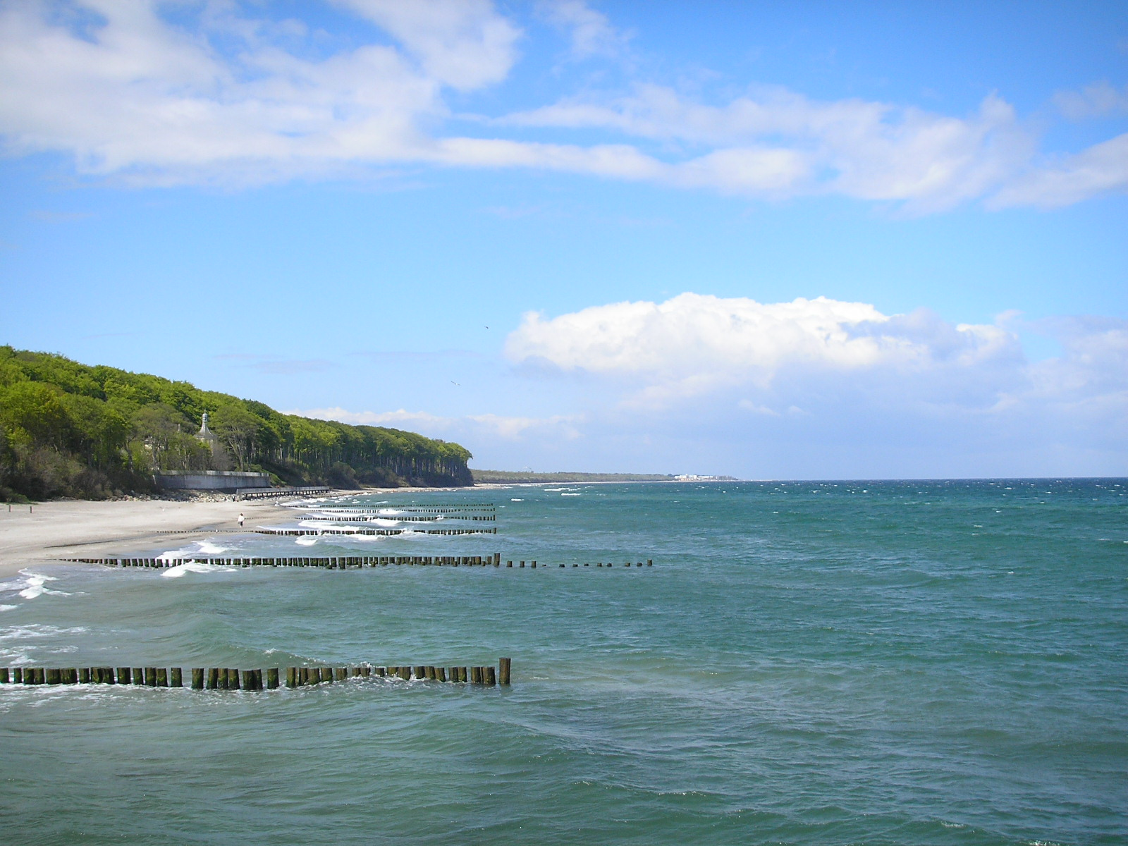 View on Kühlungsborn from Heiligendamm.